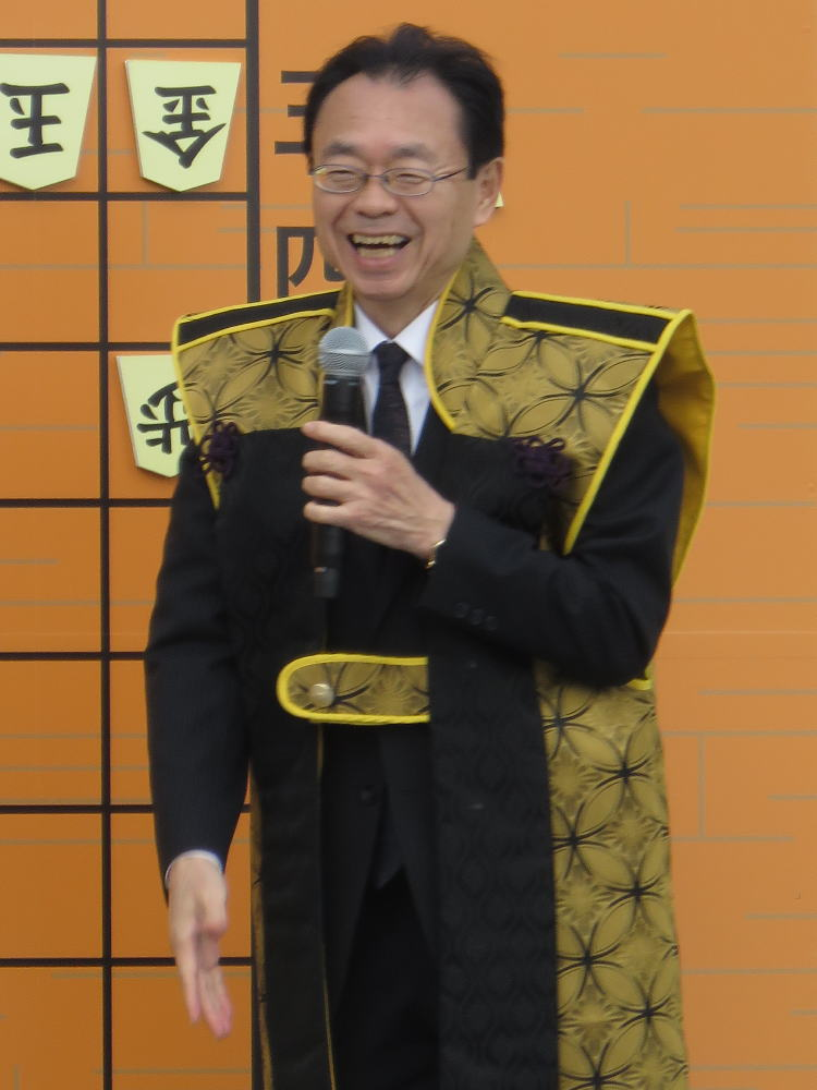 将棋棋士の東和男（平成２８年１１月、姫路市で行われた人間将棋にて）